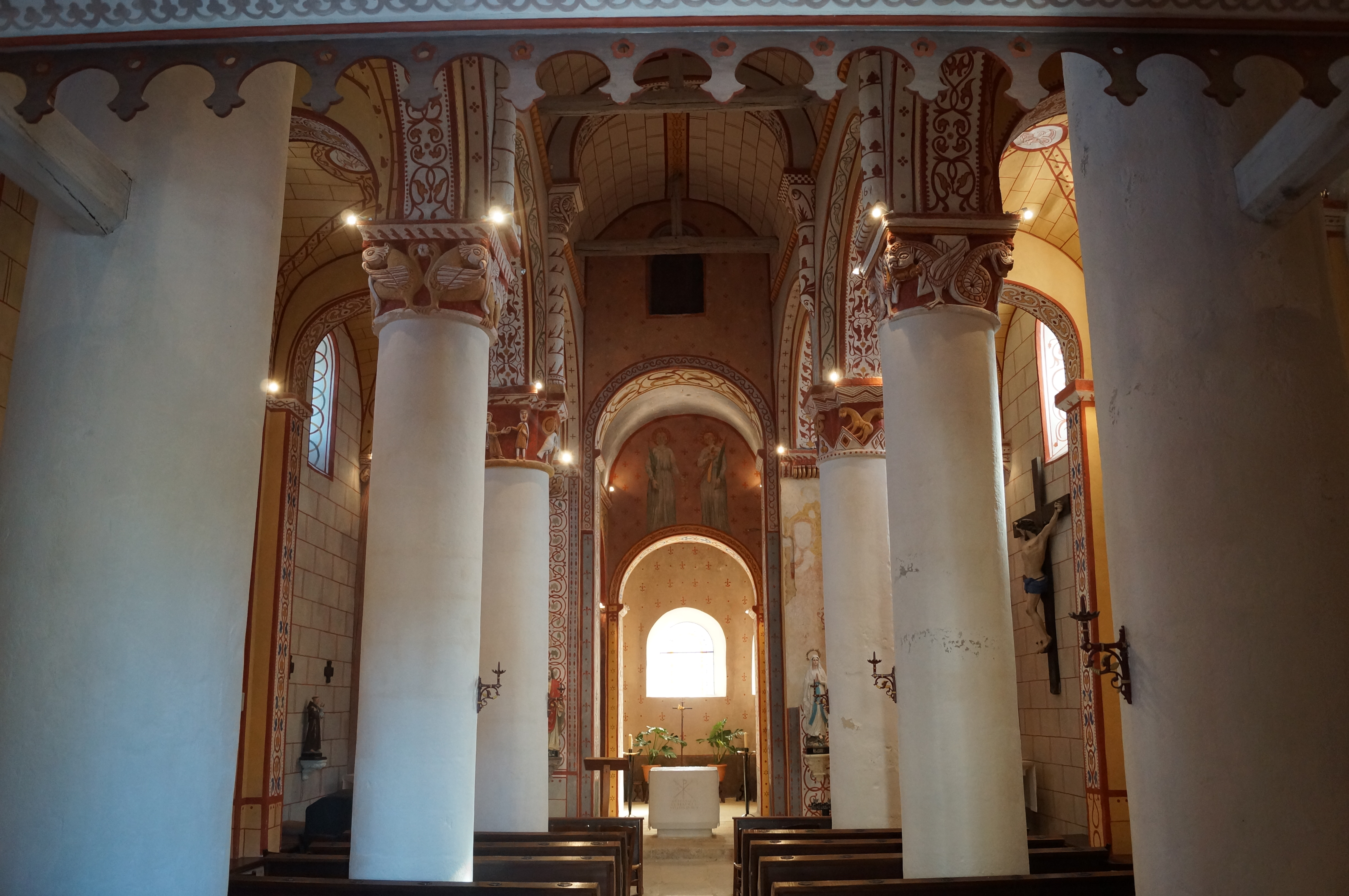 Vue de la nef de l'église de Civaux